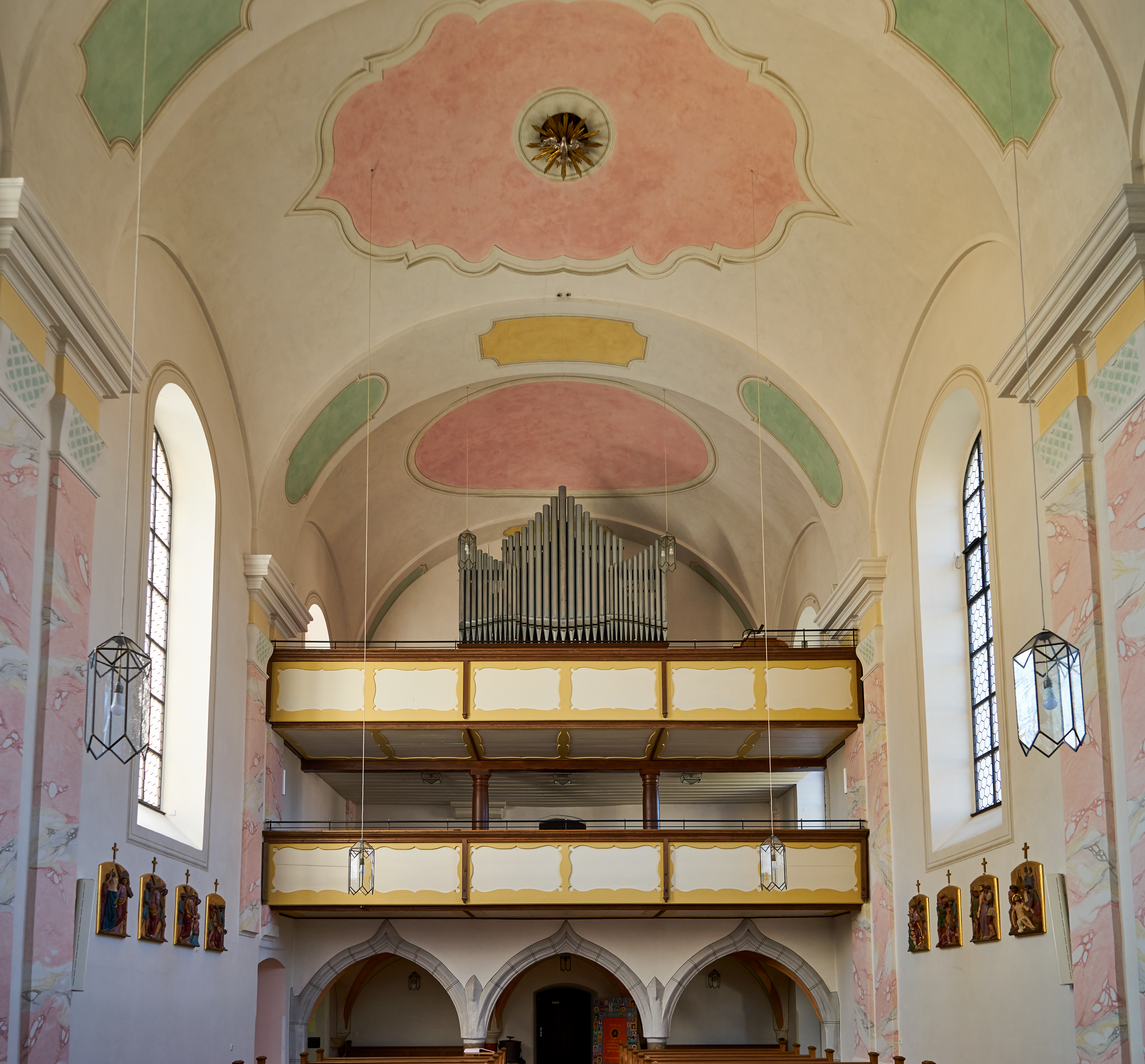 Katholische Pfarrkirche St. Ulrich, Pocking. Das Langhaus und die Westempore mit der Orgel aus dem Jahr 1955.